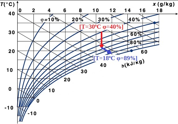 Przebieg chłodzenia ewaporacyjnego pośrednio-bezpośredniego